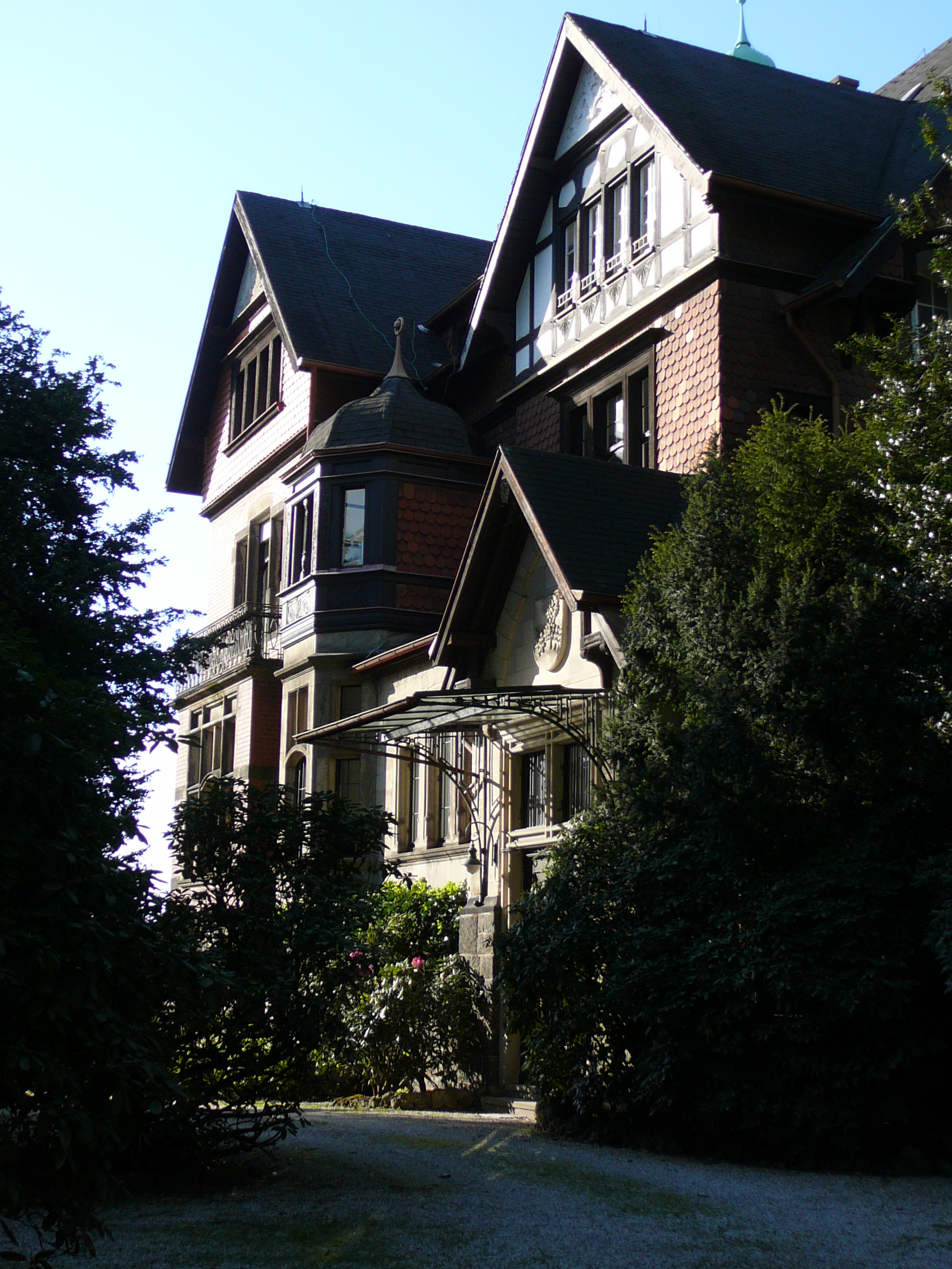 Zur Waldesruh, Wuppertal